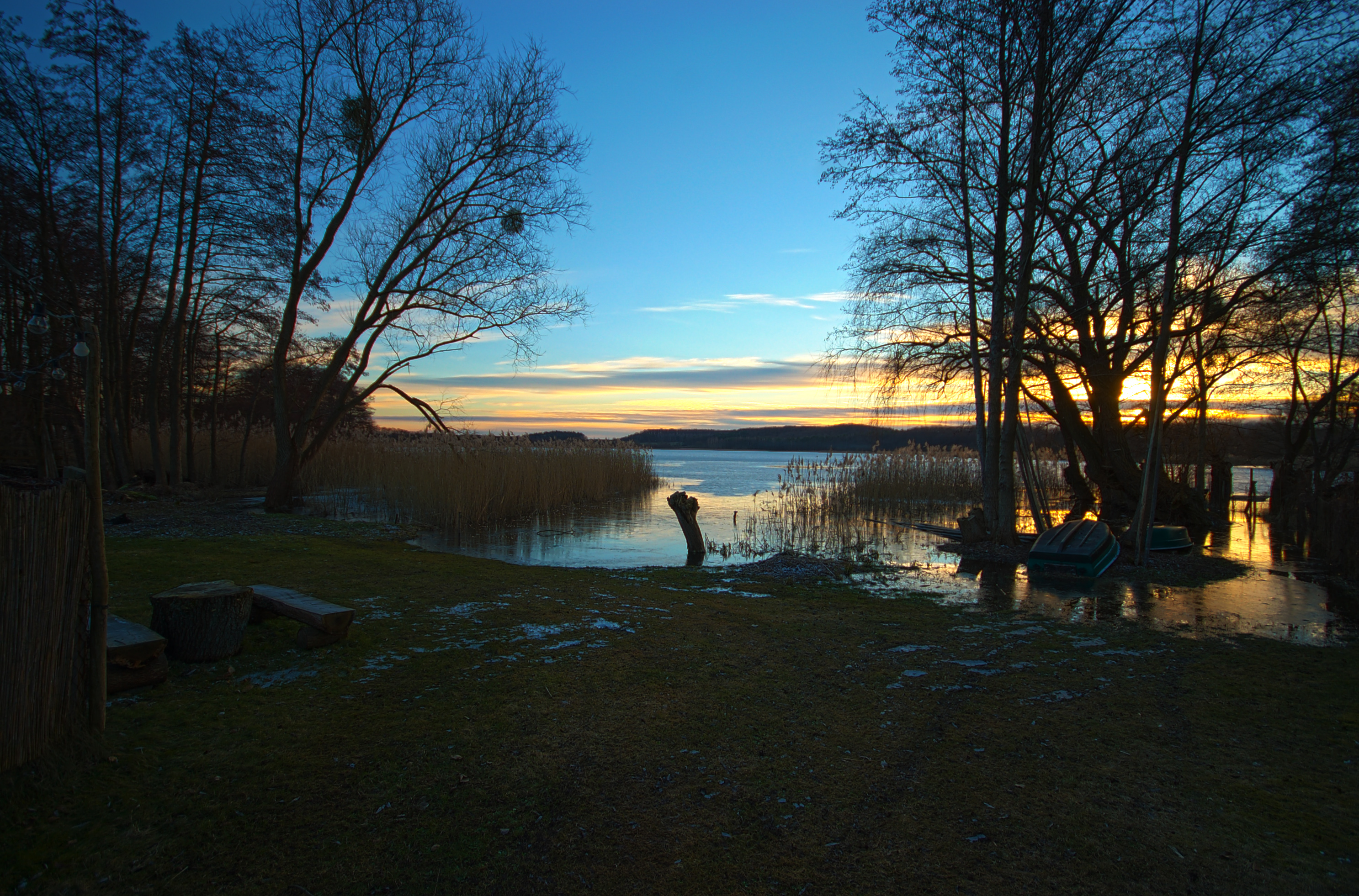 Brodowin